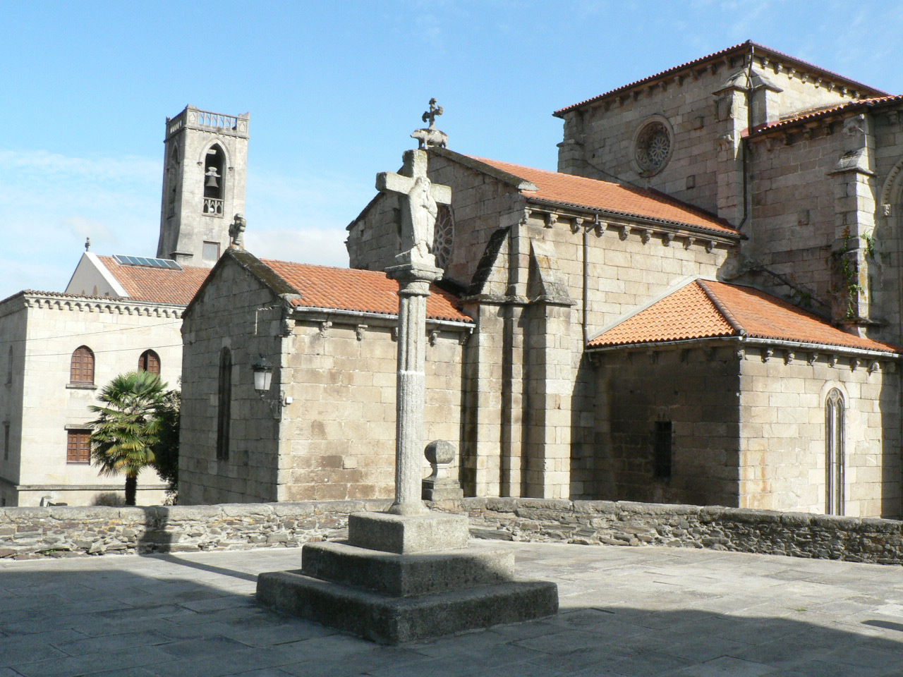 Igrexas de Betanzos - Igrexa de San Francisco, XIV século